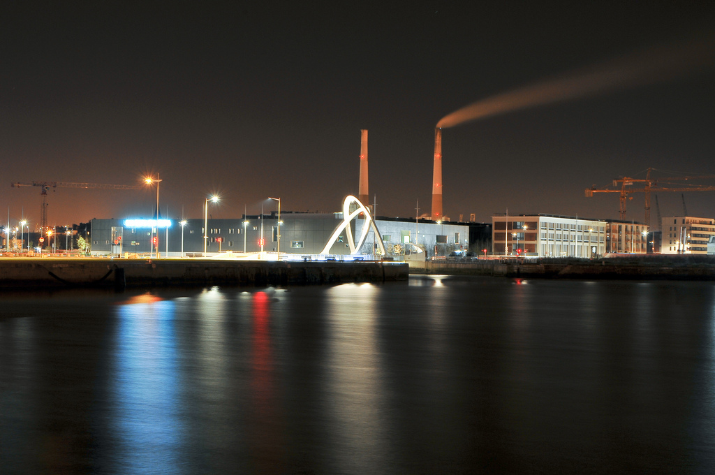 Les bains des docks et la centrale EDF